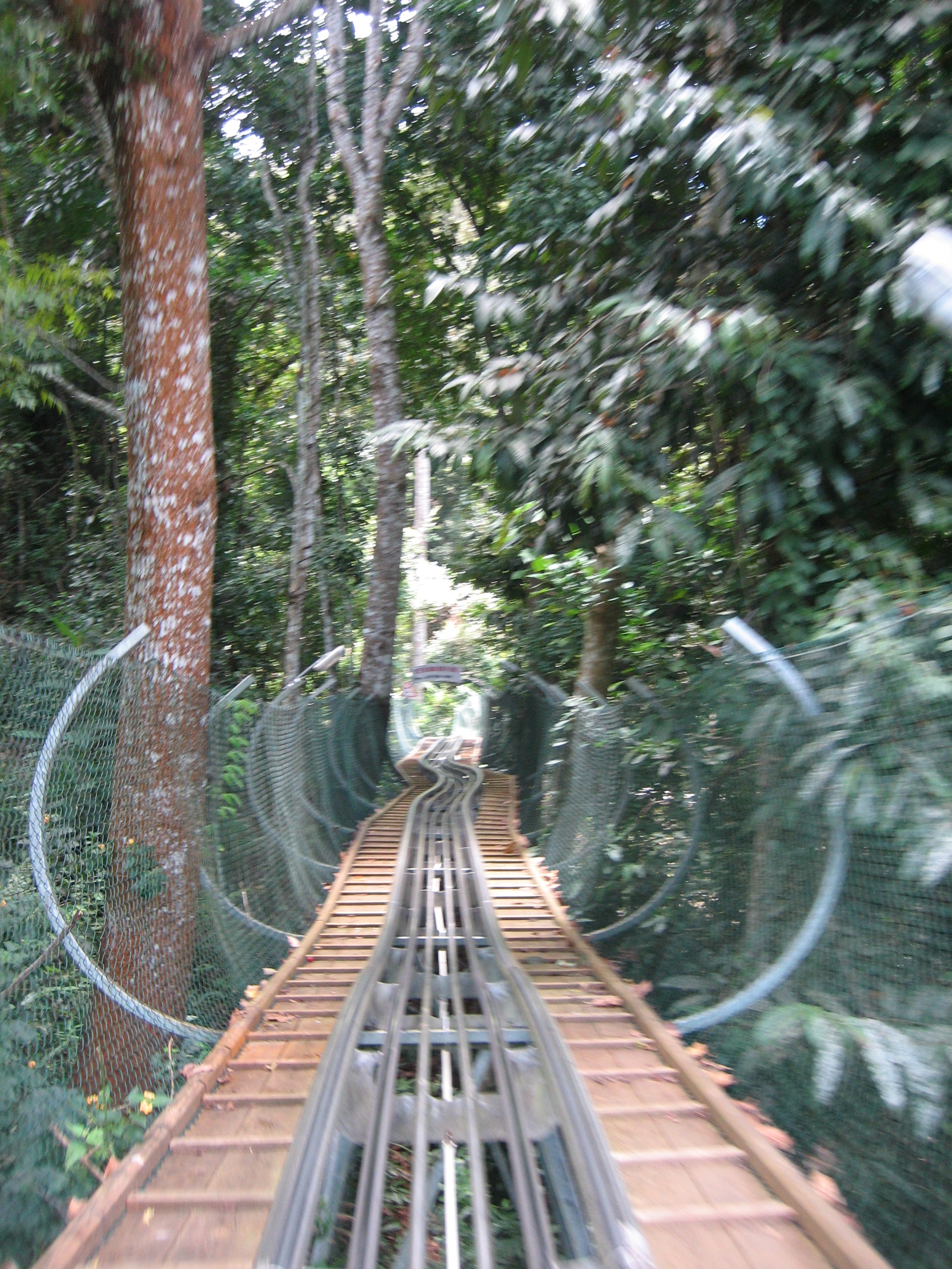 Alpine Sled, Datanla Waterfall.